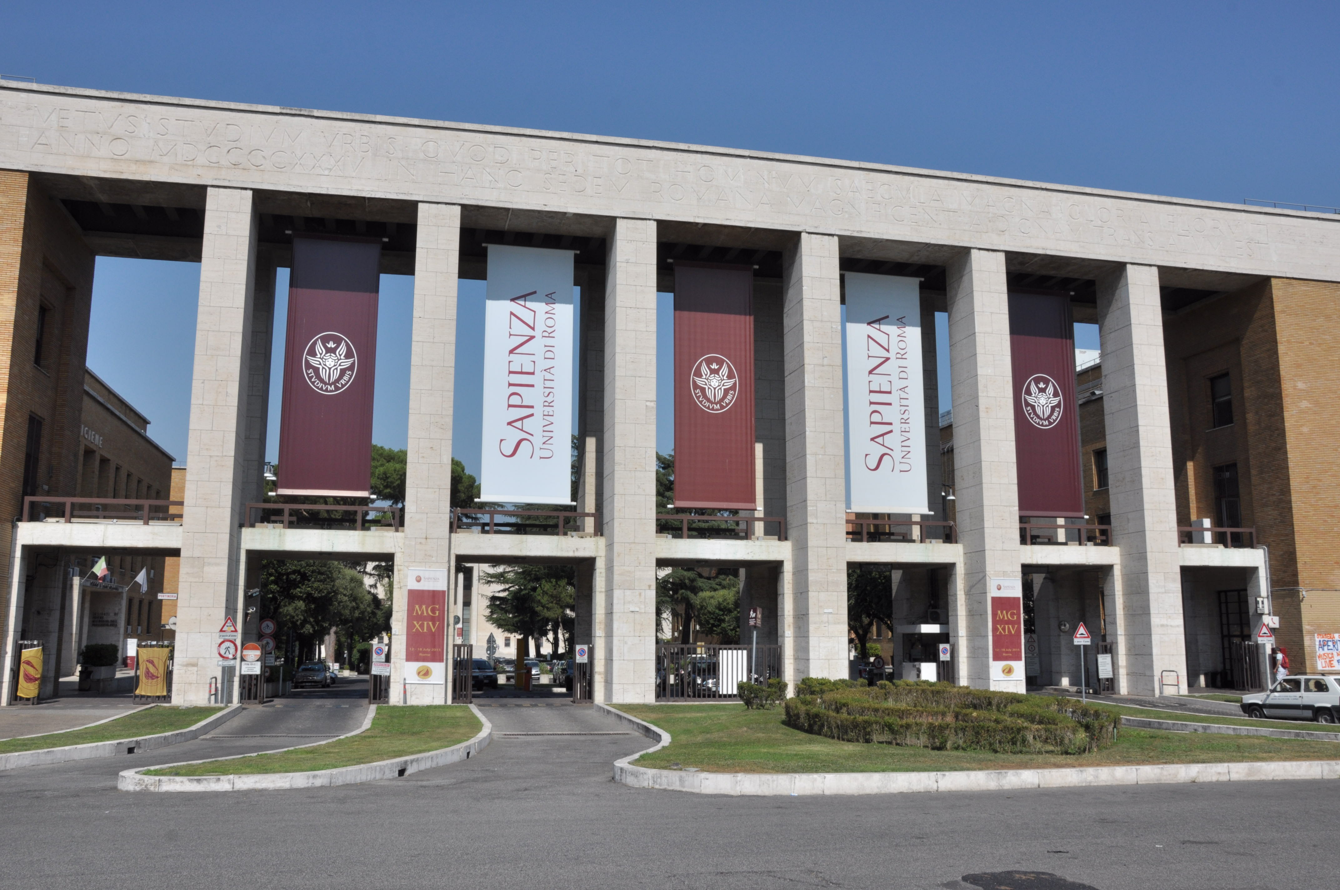 Entrance of Univerrsità da Roma "La Sapienza" during MG14